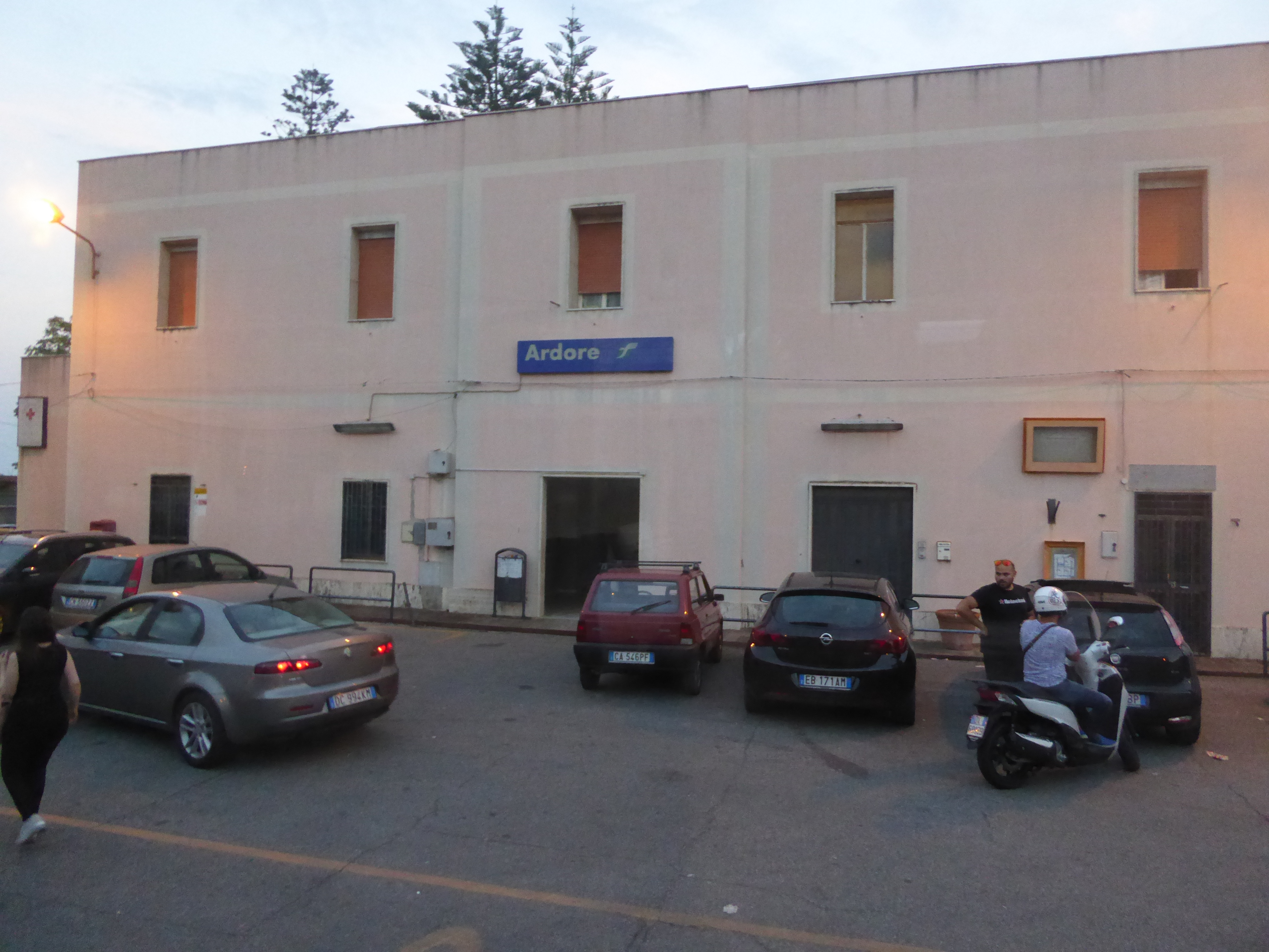 Stazione ferroviaria di Ardore.